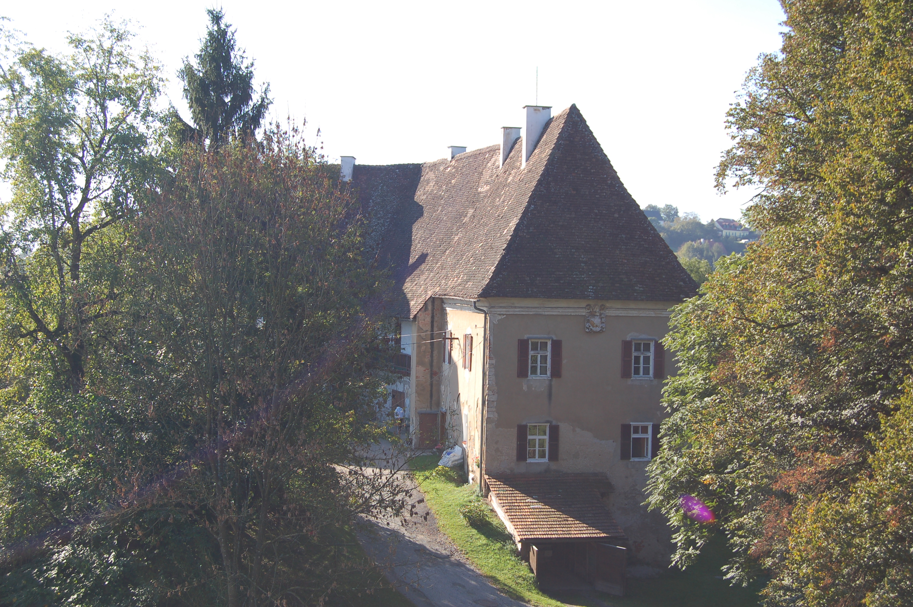 Schloss Polheim